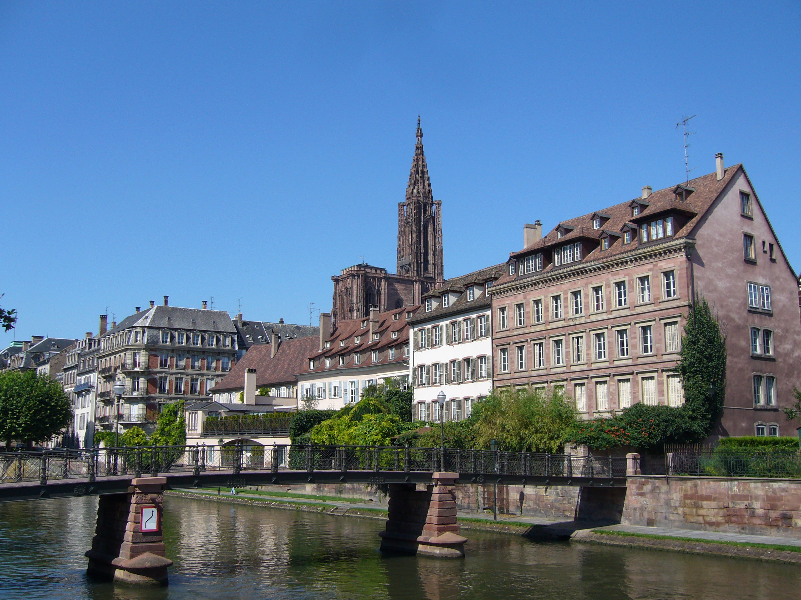 La cathédrale Notre-Dame, vue des quais. Strasbourg (France)